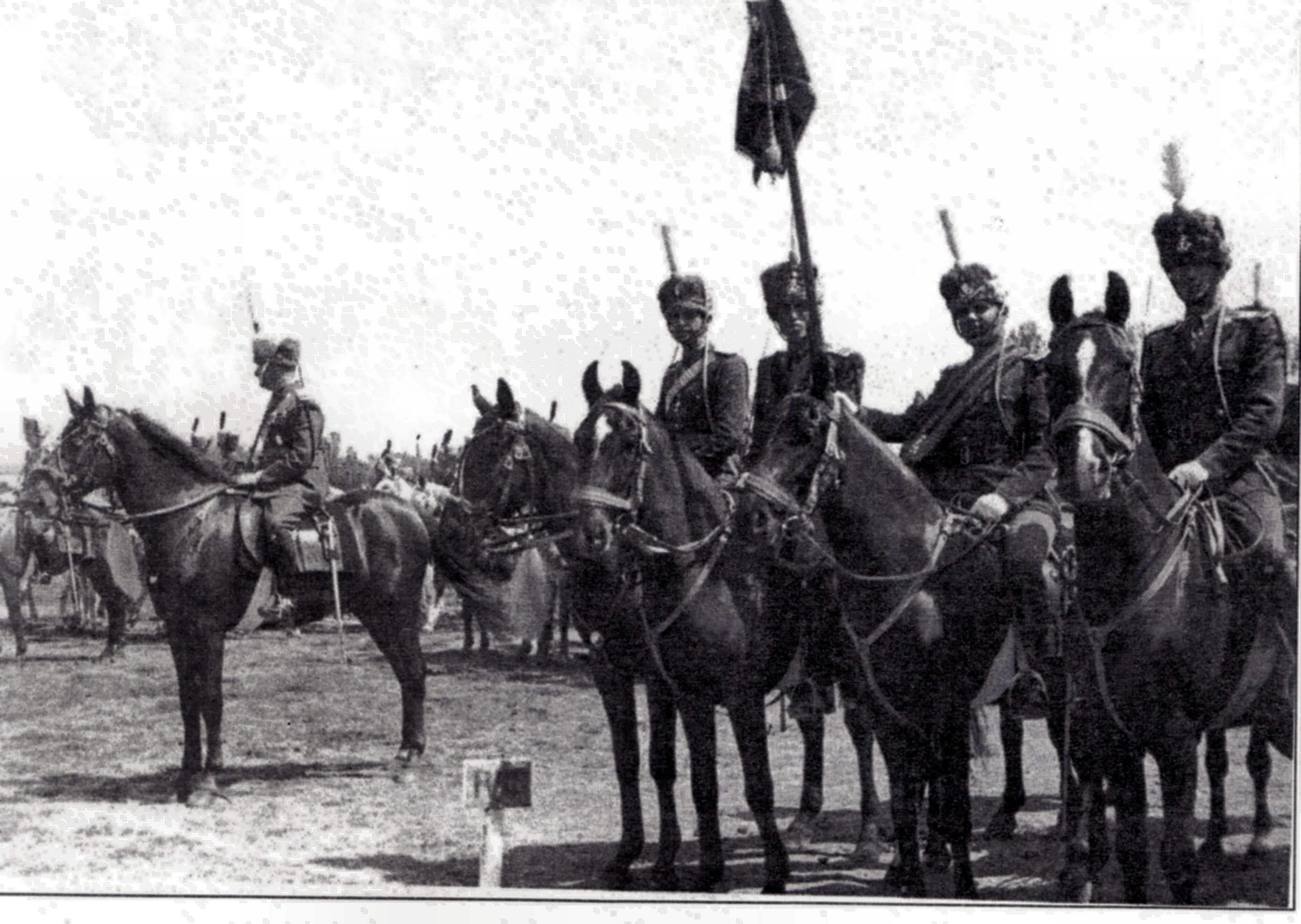 Aurel Racovitză, links., vor der Truppenparade mit seinem 4. Regiment am 10. Mai 1937